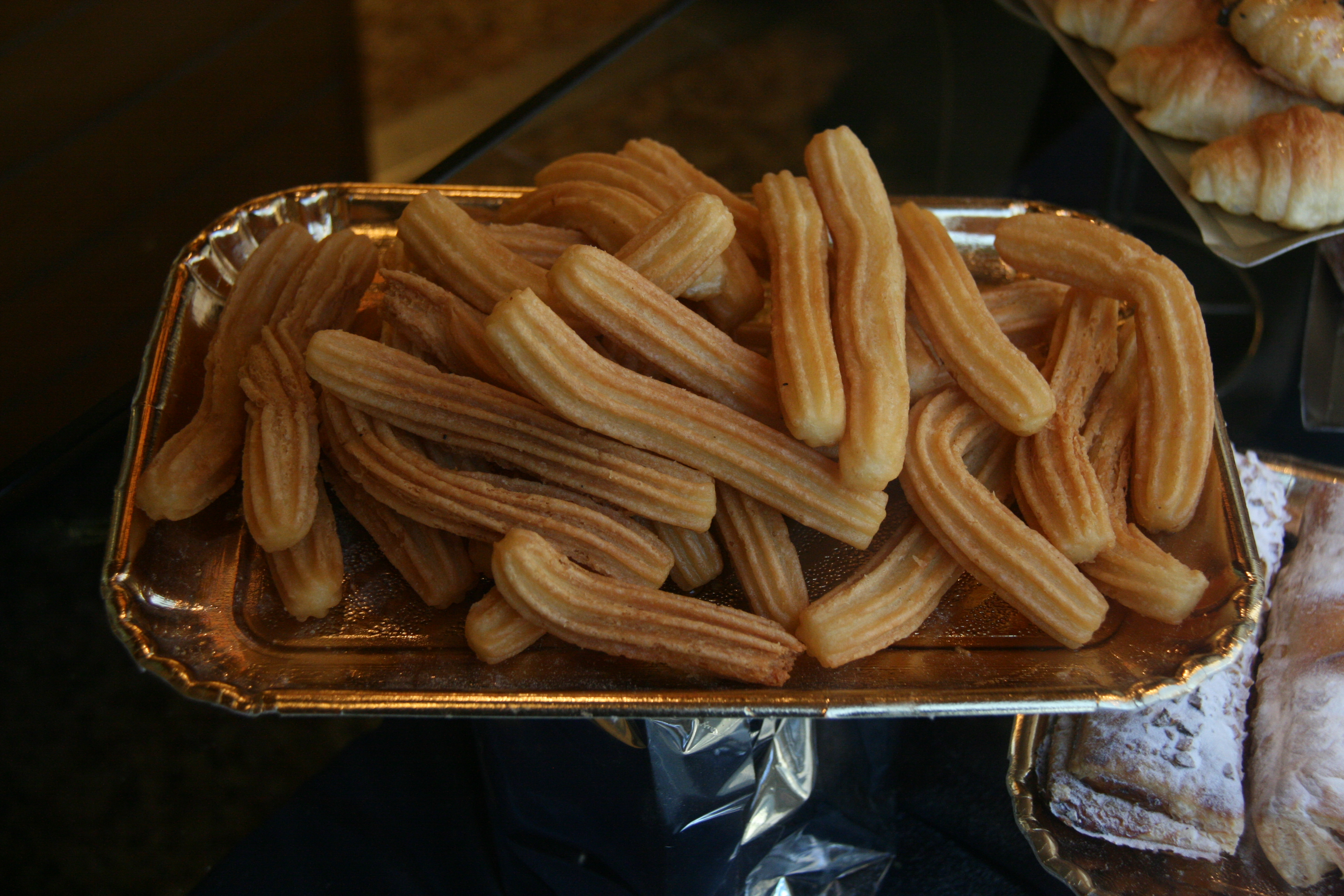 Churros en una pastelería de Barcelona